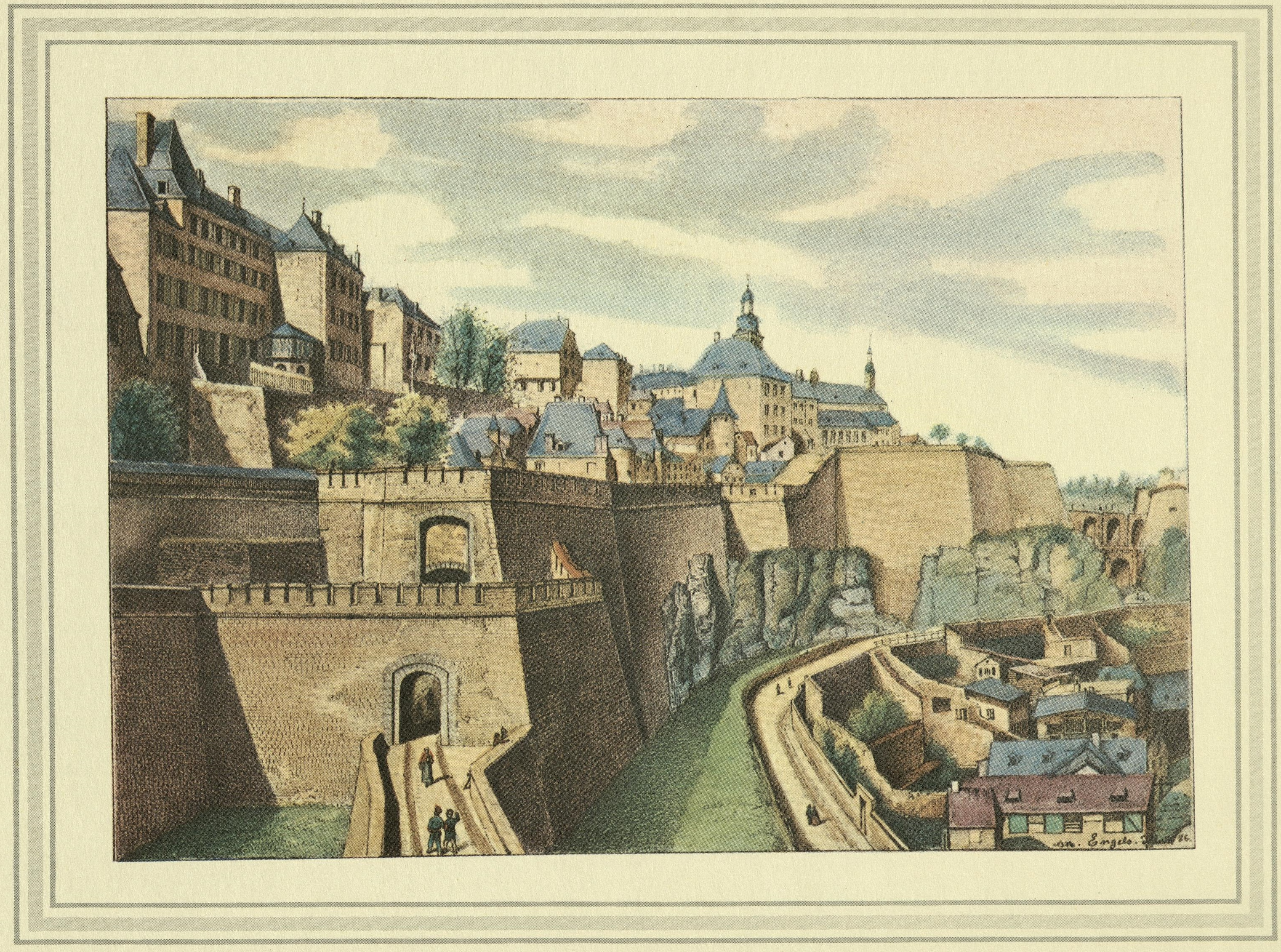 Dessin pittoresque de la forteresse de la Confédération germanique (Bundesfestung) Luxembourg par Michel Engels (1851-1901): IX - La rue Large et la rue Neuve